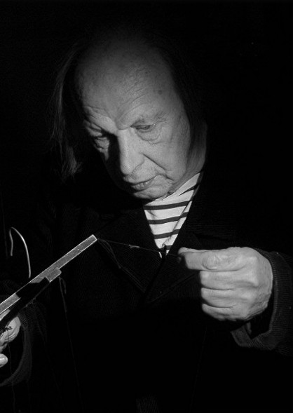 Feike Boschma in 2005 (foto: Martin van der Veen)